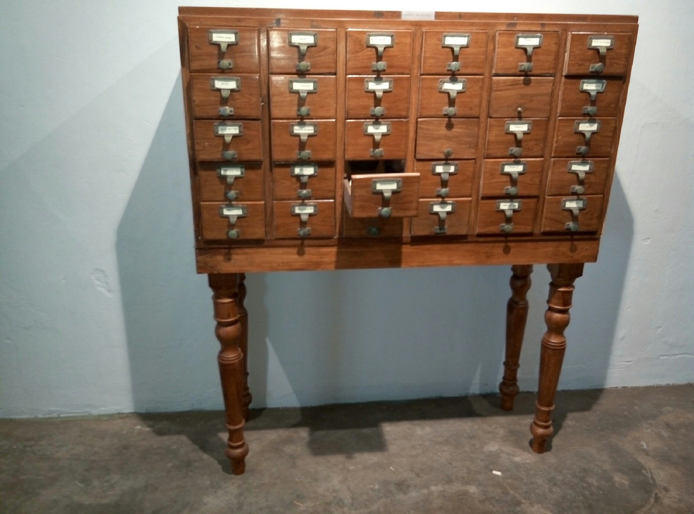 ക്യാബിനറ്റ് ഓഫ് റസിസ്റ്റൻസ് നമ്പർ 2 installation in KMB16